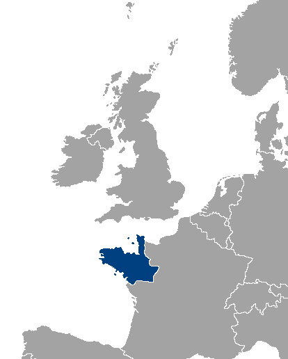 Breizh-Vras hervez mennadoù 'zo.